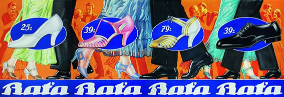 Miloš Slovák - Baťa